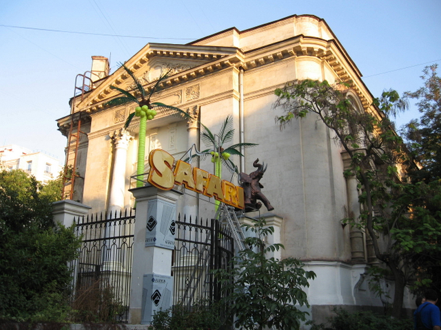 Former Karaim kenassa in Sevastopol